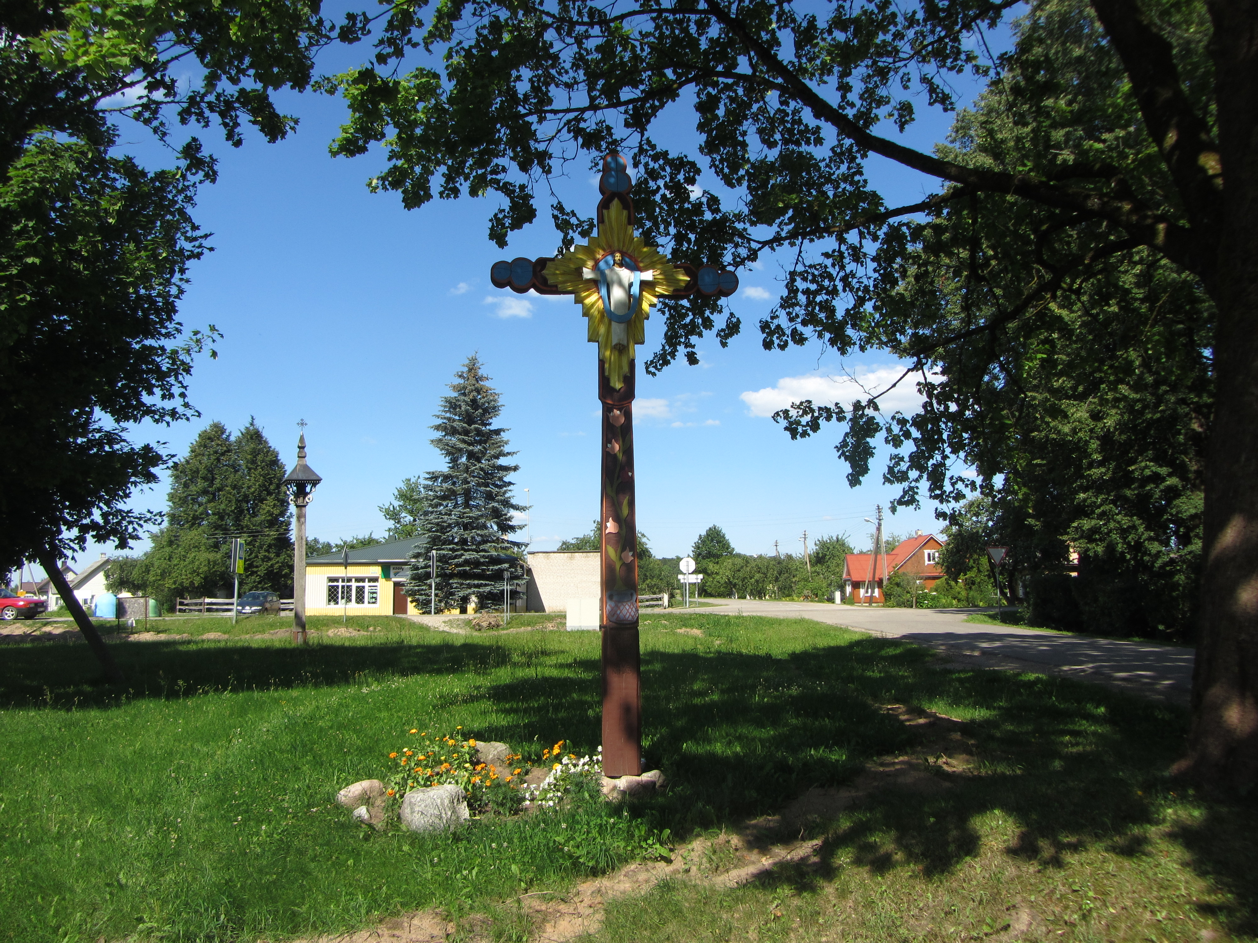 Zibalai, Lithuania